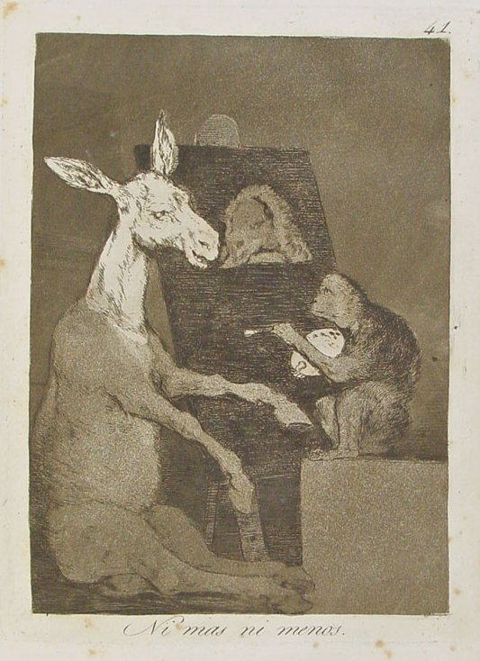 Capricho nº 41: Ni más ni menos de Goya, serie Los Caprichos